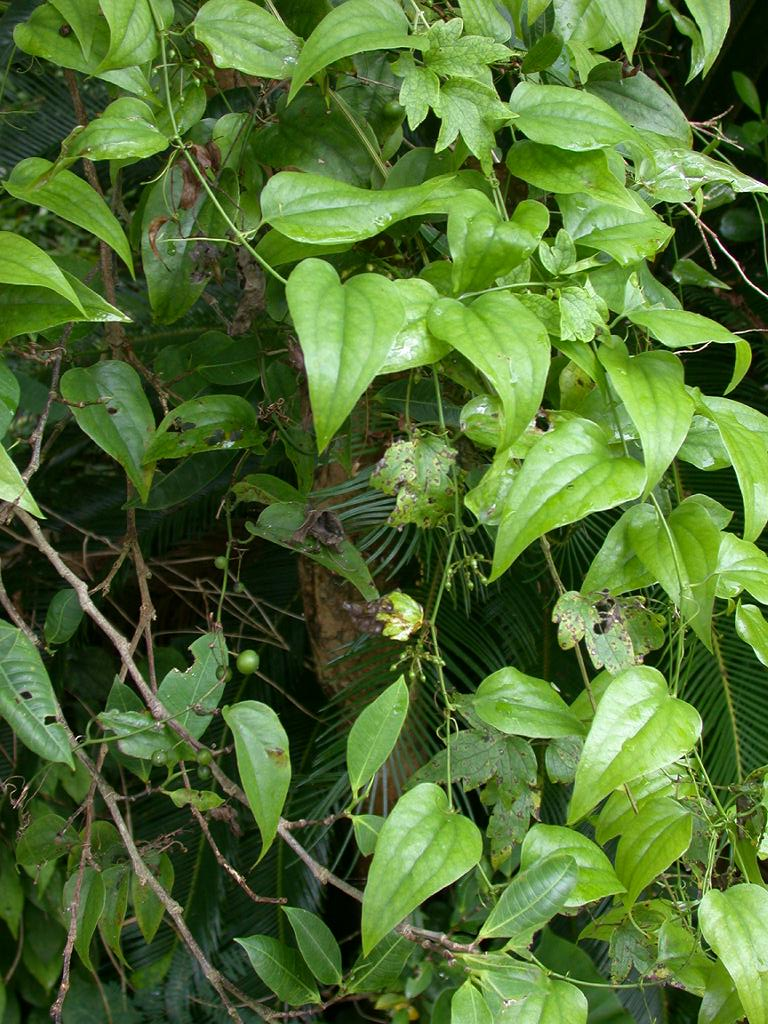 Heterosmilax japonica：カラスキバサンキライ 2004/08/10 沖縄本島：Okinawa Island, Japan